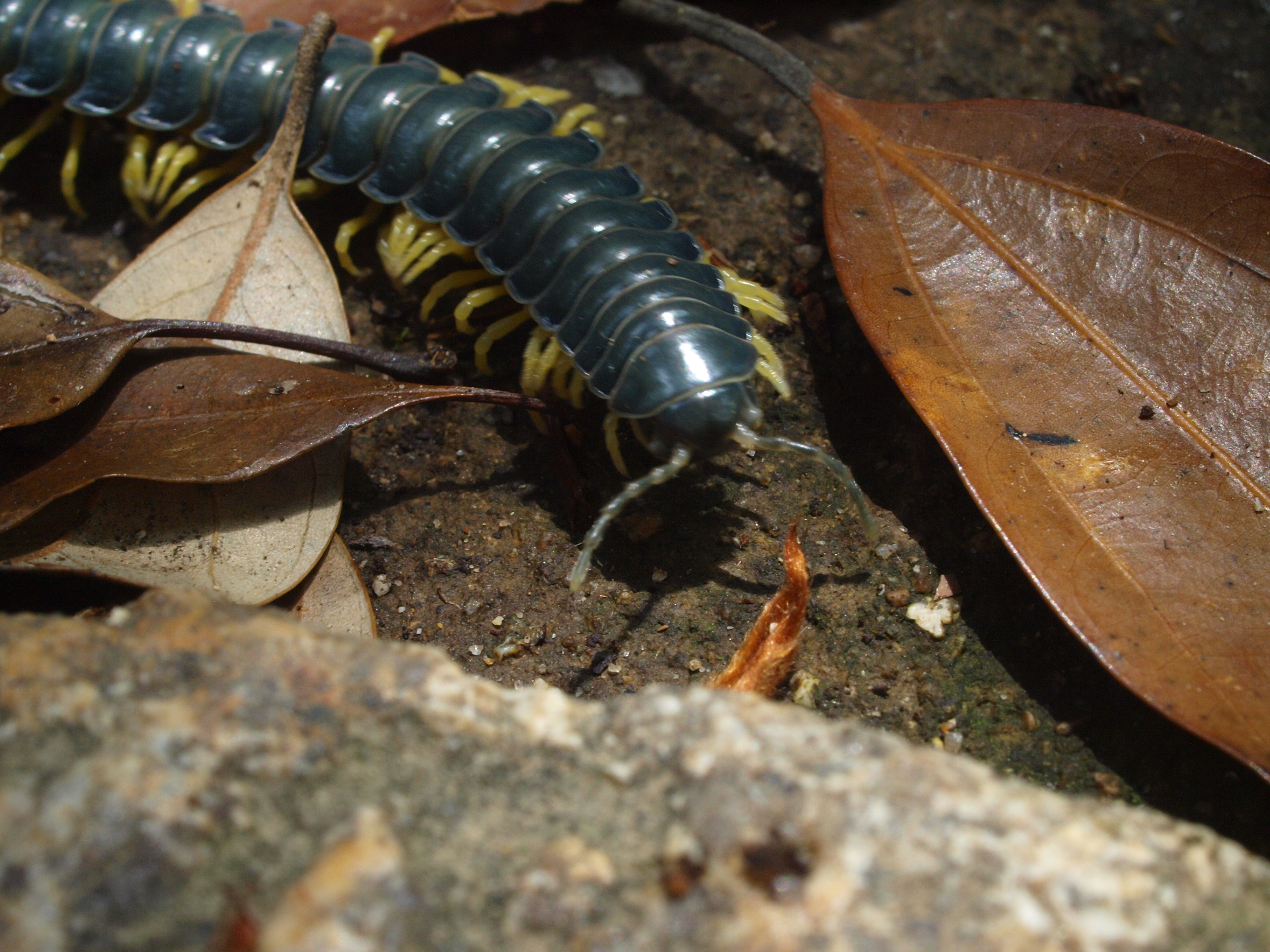 ミドリババヤスデ? 厳島（広島県廿日市市）にて。 cf. the photographer's blog.